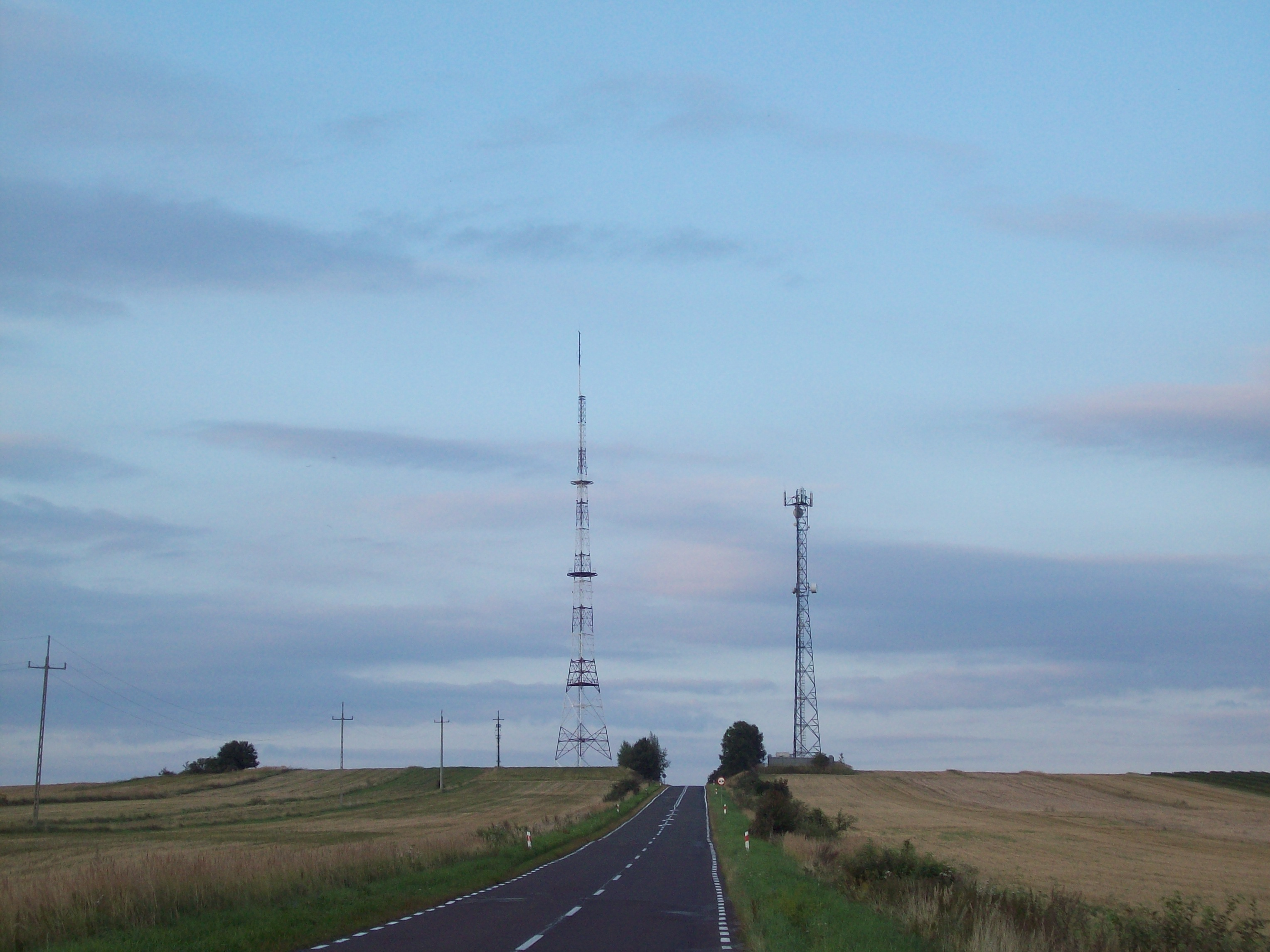 Maszt Er Piotrków (po lewej) i wieża telefonii komórkowej.